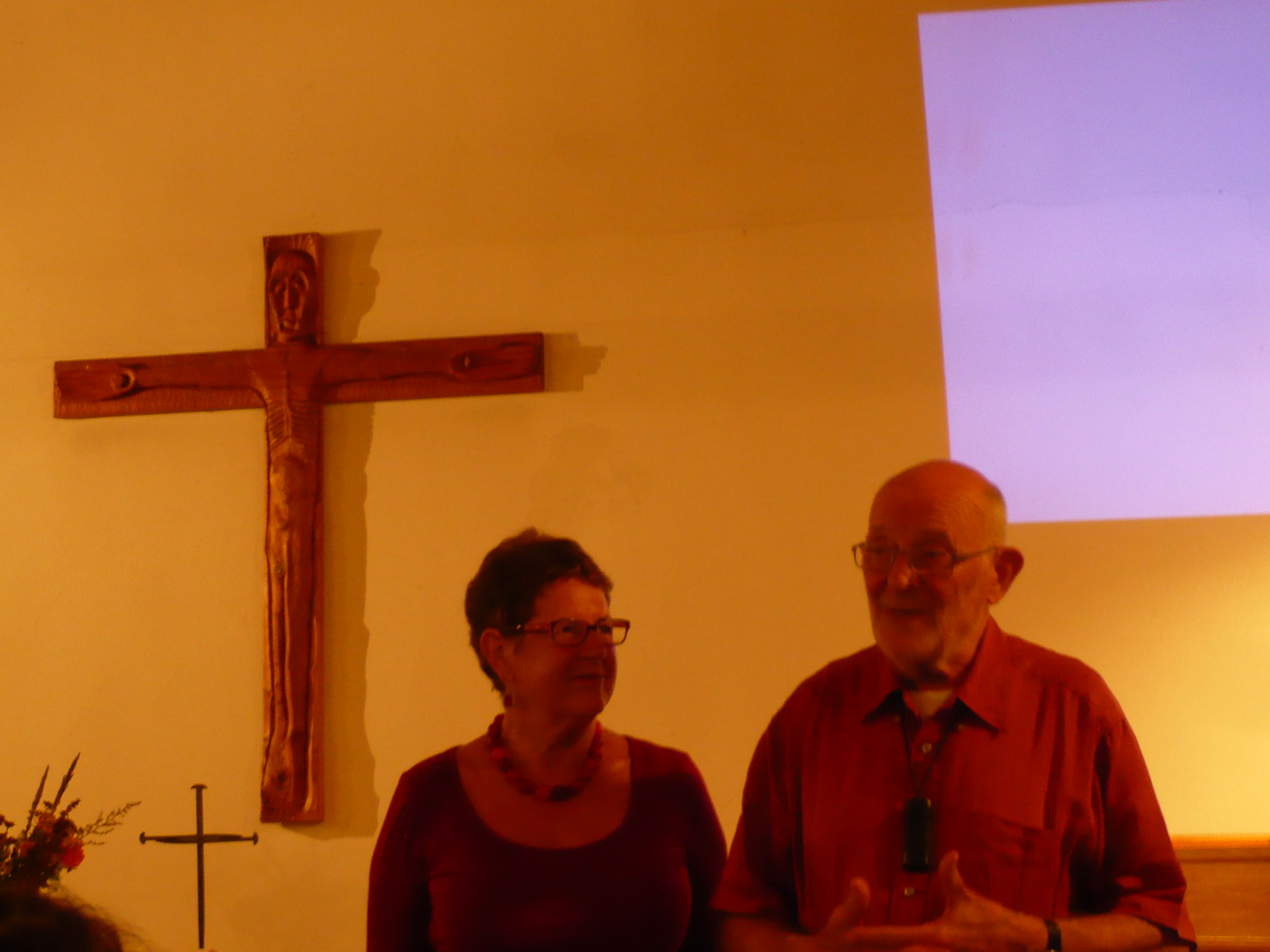 Barabara und Paul Oestreicher im Sommer 2013 im Gemeindehaus Neuendorf/Hiddensee. Im Hintergrund ein Nagelkreuz von Coventry.